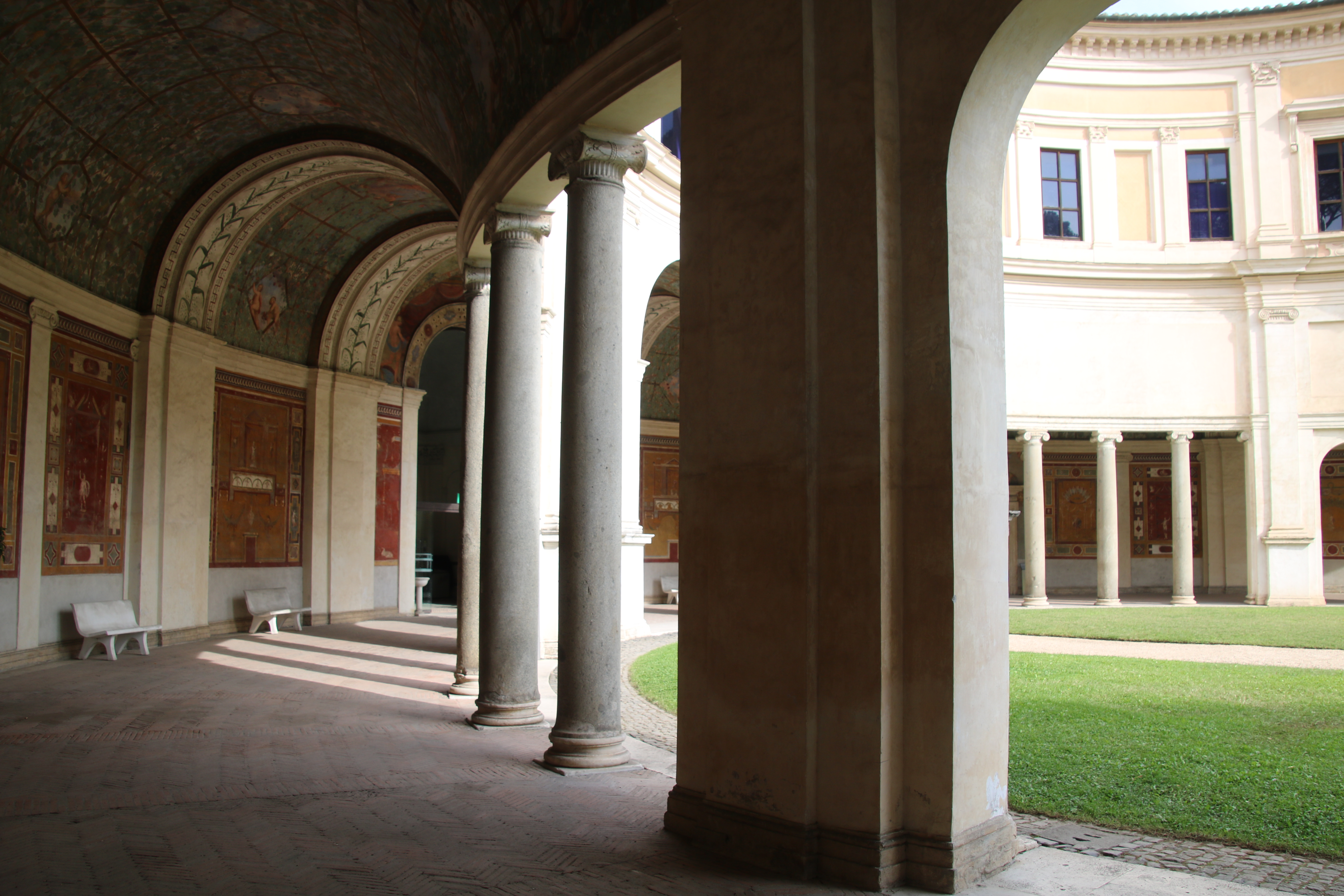 Villa giulia, portico This is a photo of a monument which is part of cultural heritage of Italy.